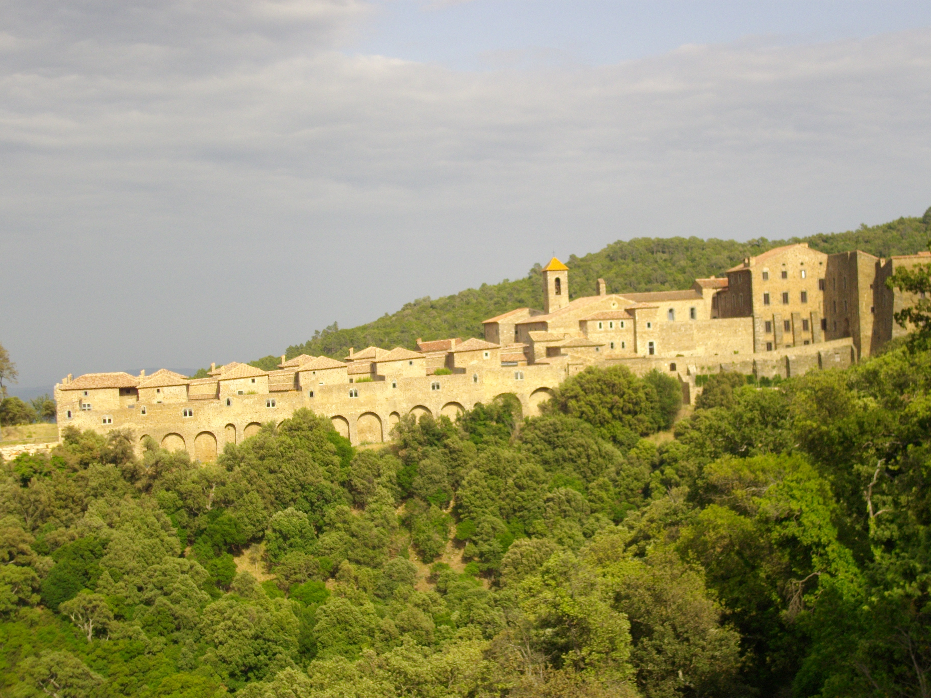 Construite sur l’emplacement d’un ancien prieuré qui portait déjà le nom de Notre Dame de la Verne, la Chartreuse fut fondée en 1170 à l’initiative de Pierre Isnard, évêque de Toulon et Frédol d’Anduse, évêque de Fréjus. .